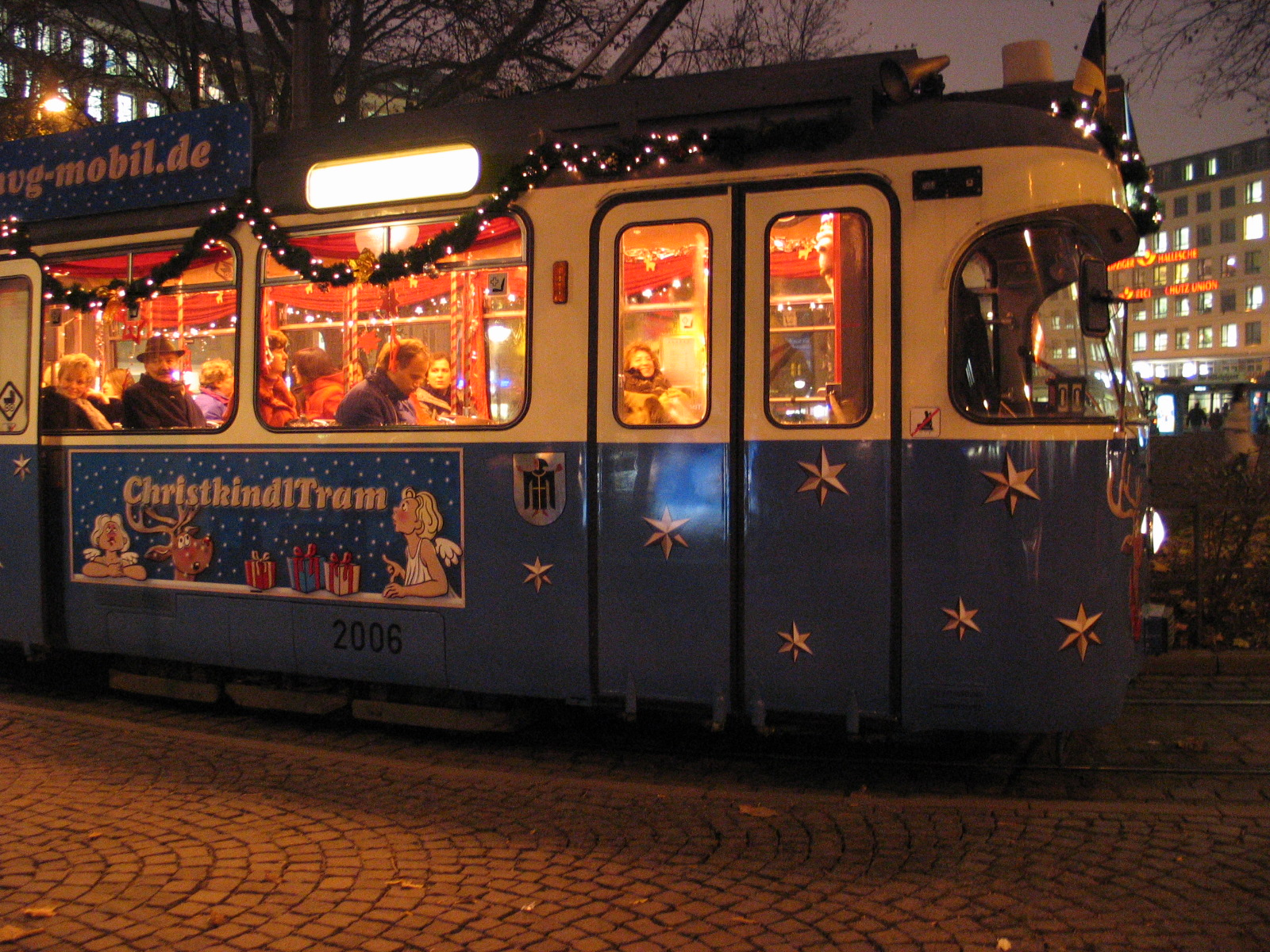 christkindl tram in munich, december 2005